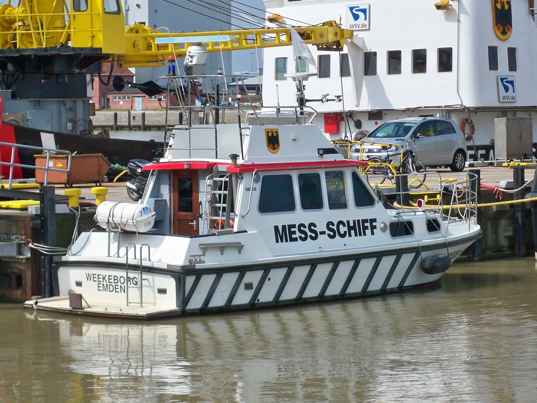 Mess-Schiff Weekeborg im Emder Außenhafen